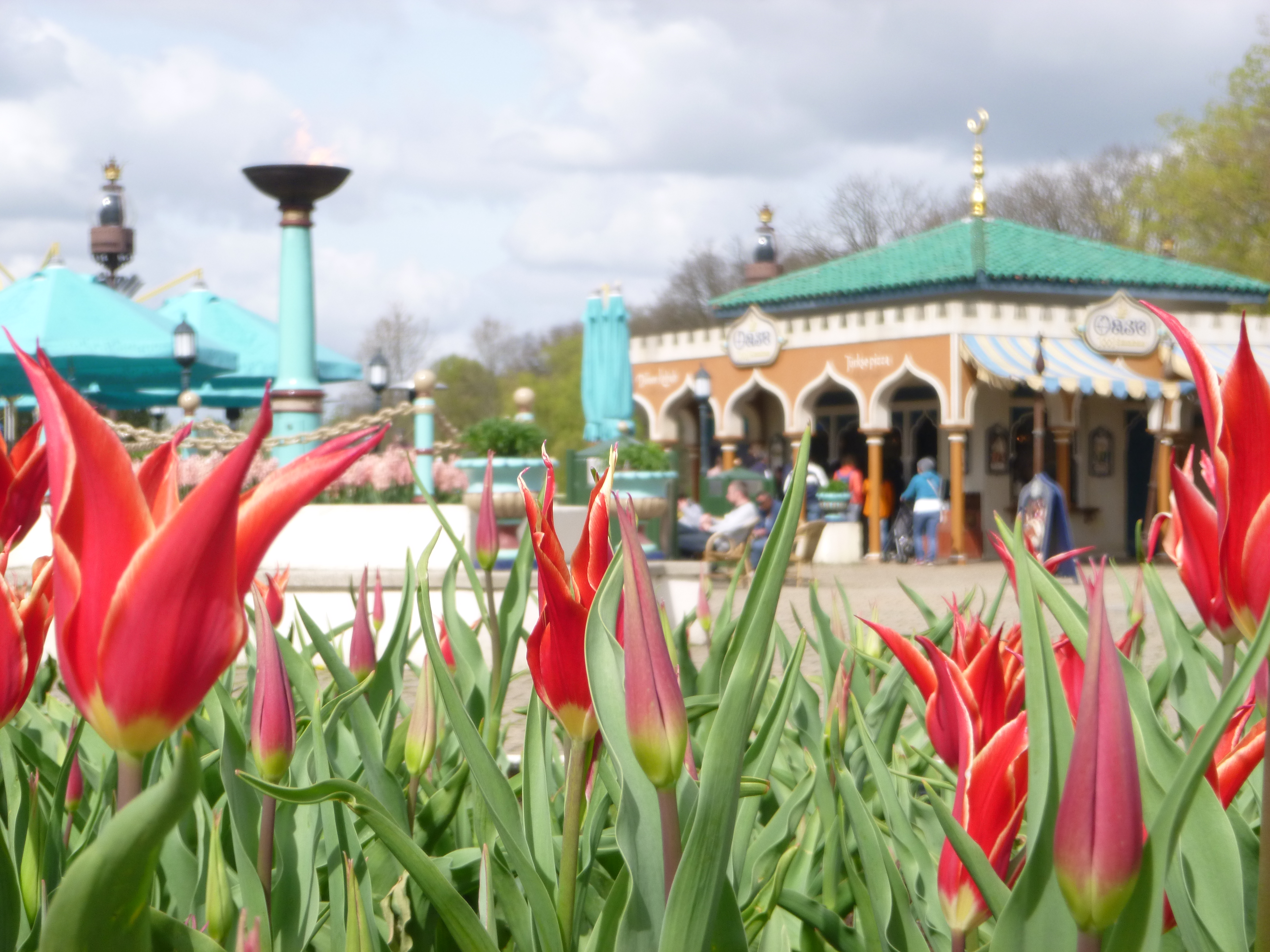 Fata Morgana tulipes